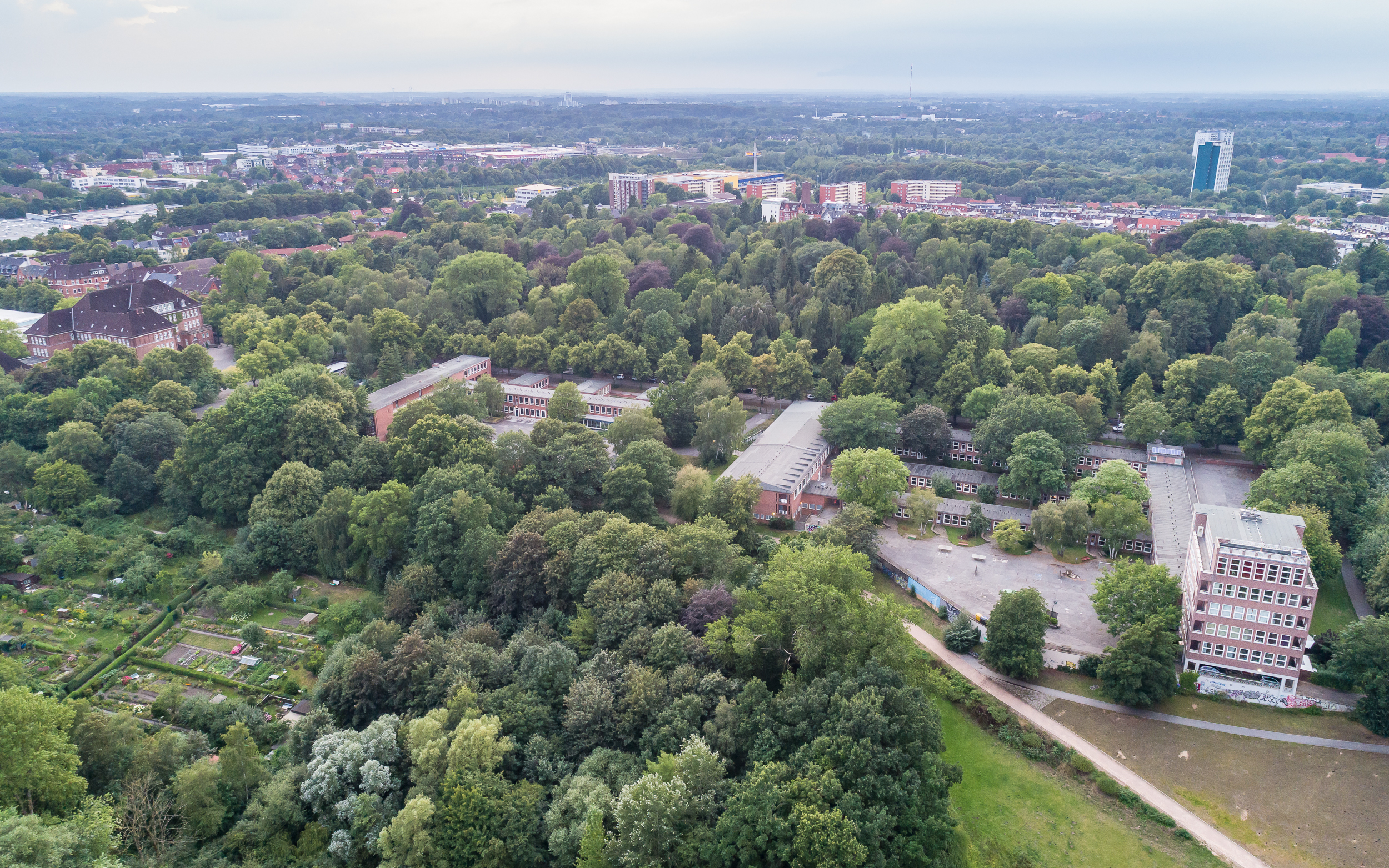 Die an die Moorteichwiese (unten links) angrenzende Max-Planck-Schule in Kiel, oberhalb dieser Schule der Südfriedhof Kiel.